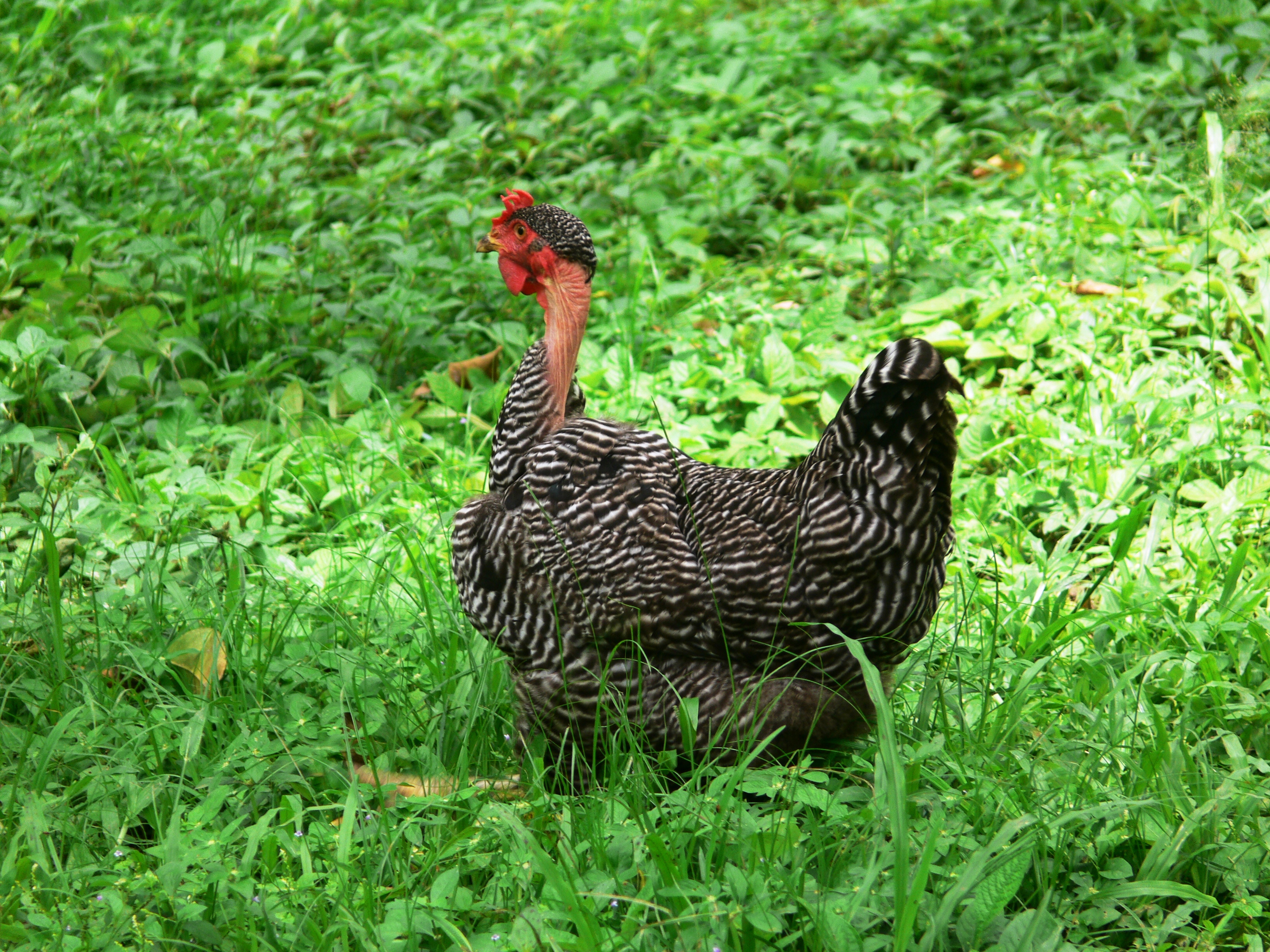 Gallina Pi-RocK barrada en pastoreo.